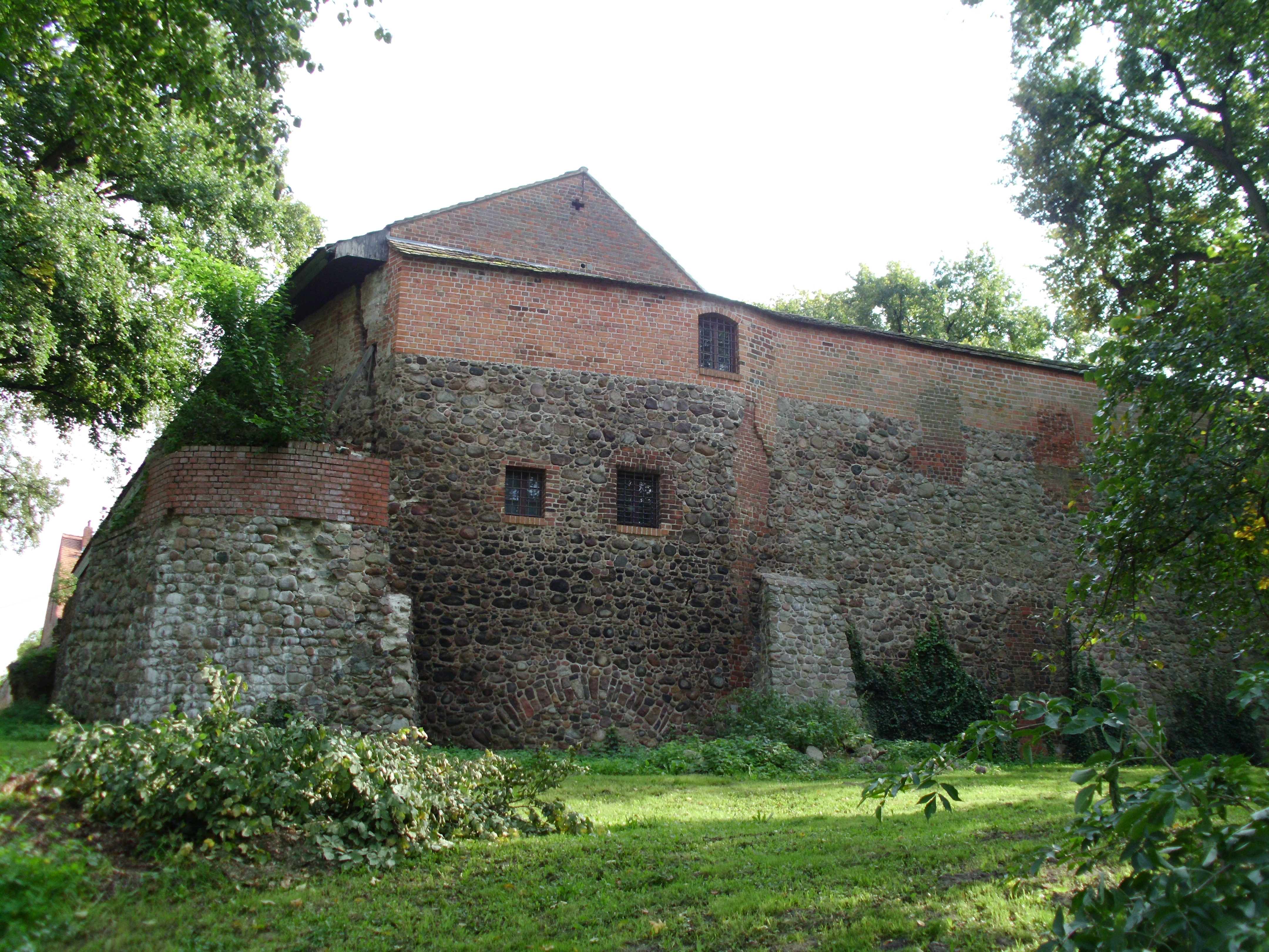 Teil der Außenanlage der Burg Beeskow, Beeskow, Landkreis Oder-Spree, Brandenburg, Germany